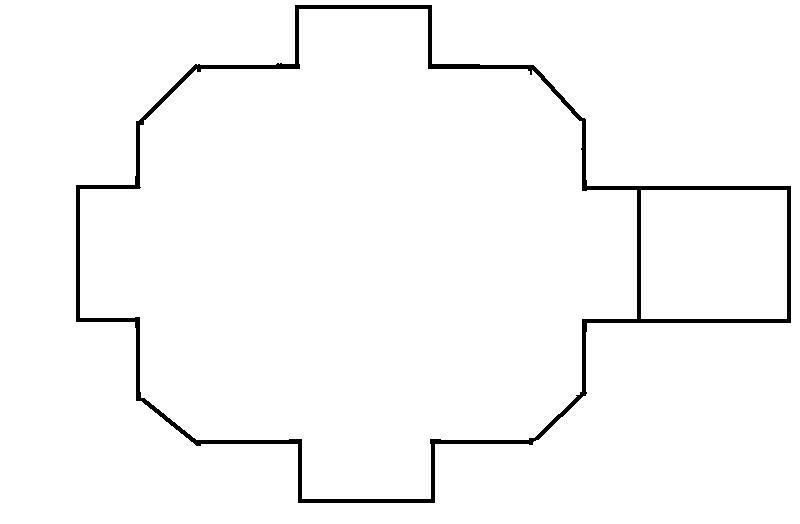 Zeigt den Grundriss der Heilig Geist Kirche Nümbrecht